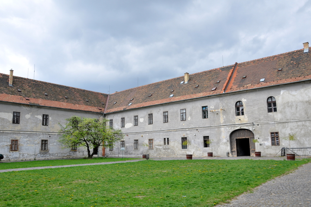 Zichy Palace, Óbuda, Budapest, Hungary